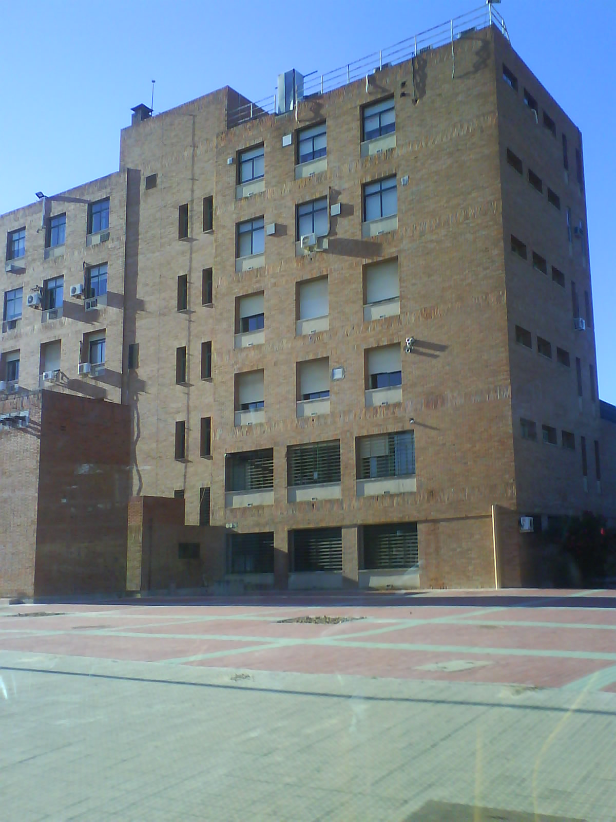 Torri Químicas, en Céncias (Baajós)